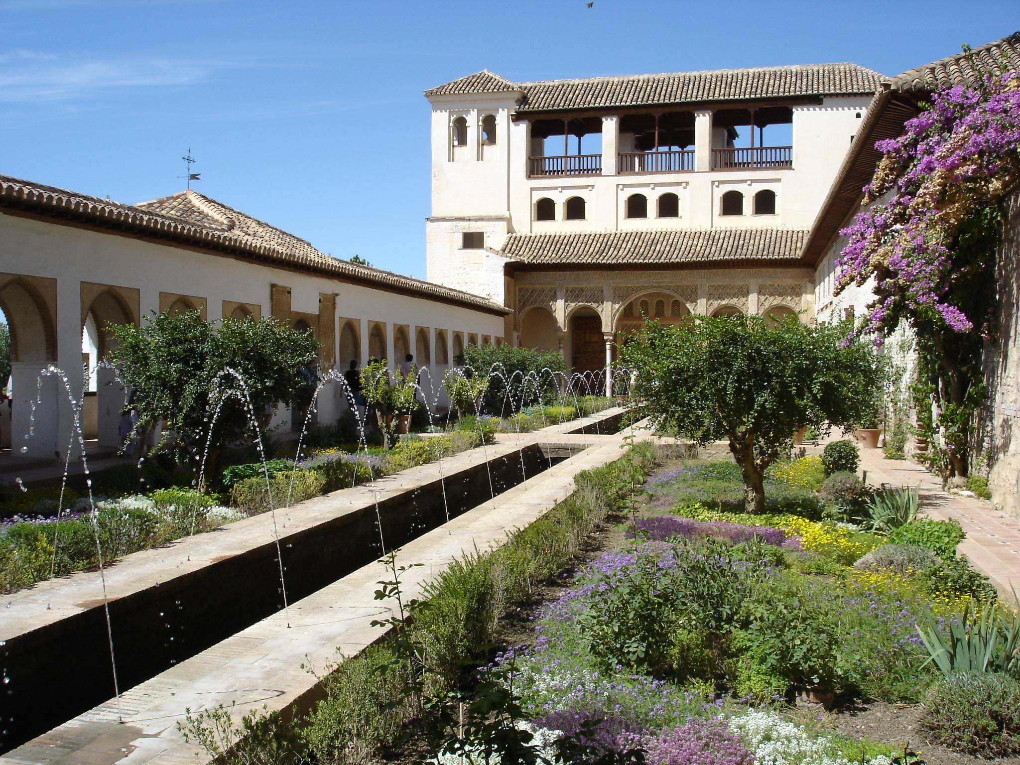 Nous entrons ici dans le coeur de l'art des jardins musulmans. Copyleft. Je suis l'auteur de cette photographie.